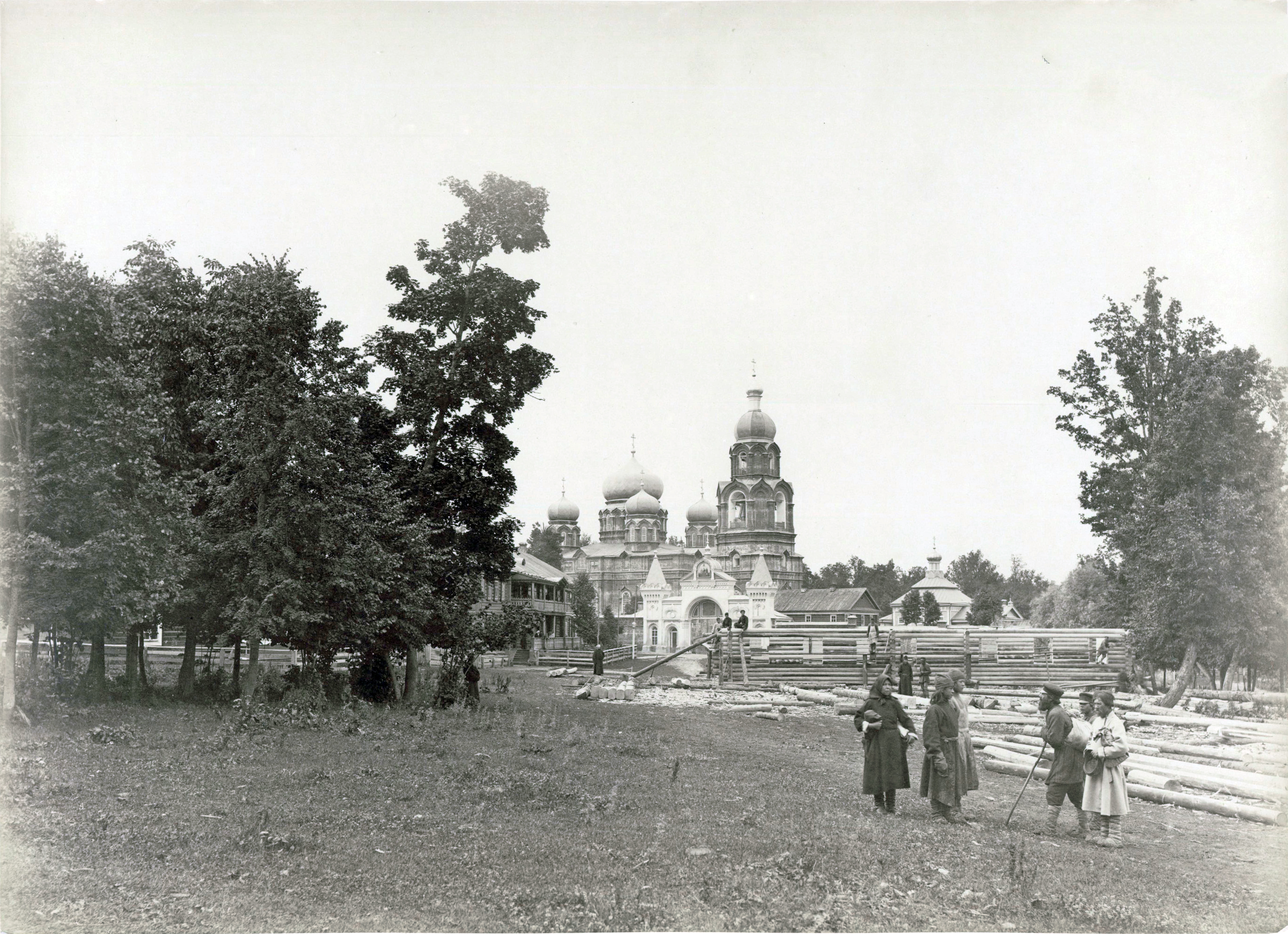 Козьмодемьянский Михаило-Архангельский черемисский мужской монастырь. Общий вид. На переднем плане – монахи с местными жителями